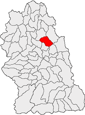 Categorie:Hărţi ale judeţului Hunedoara